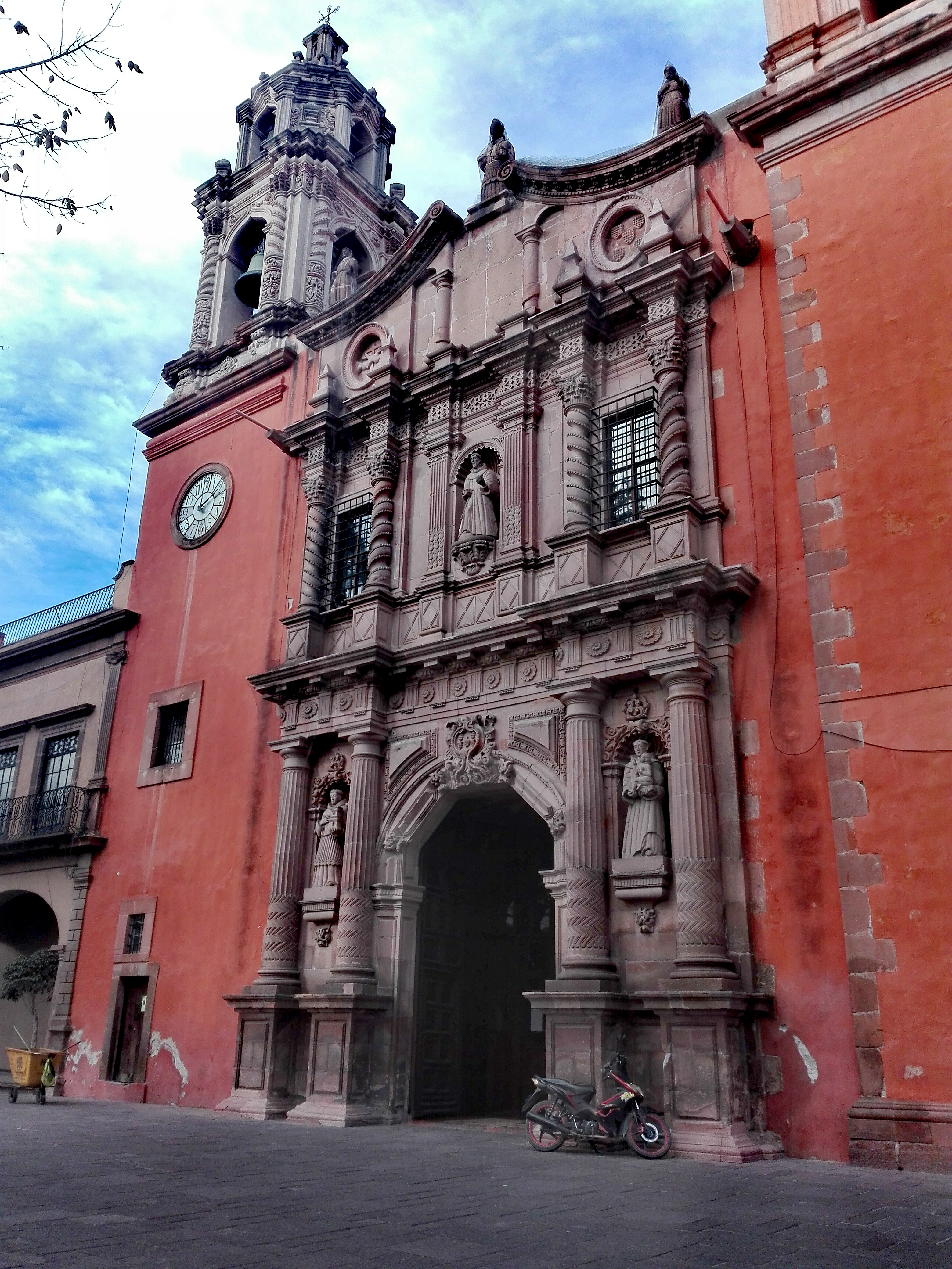 Templo de San Francisco de Asís, San Luis Potosí, México